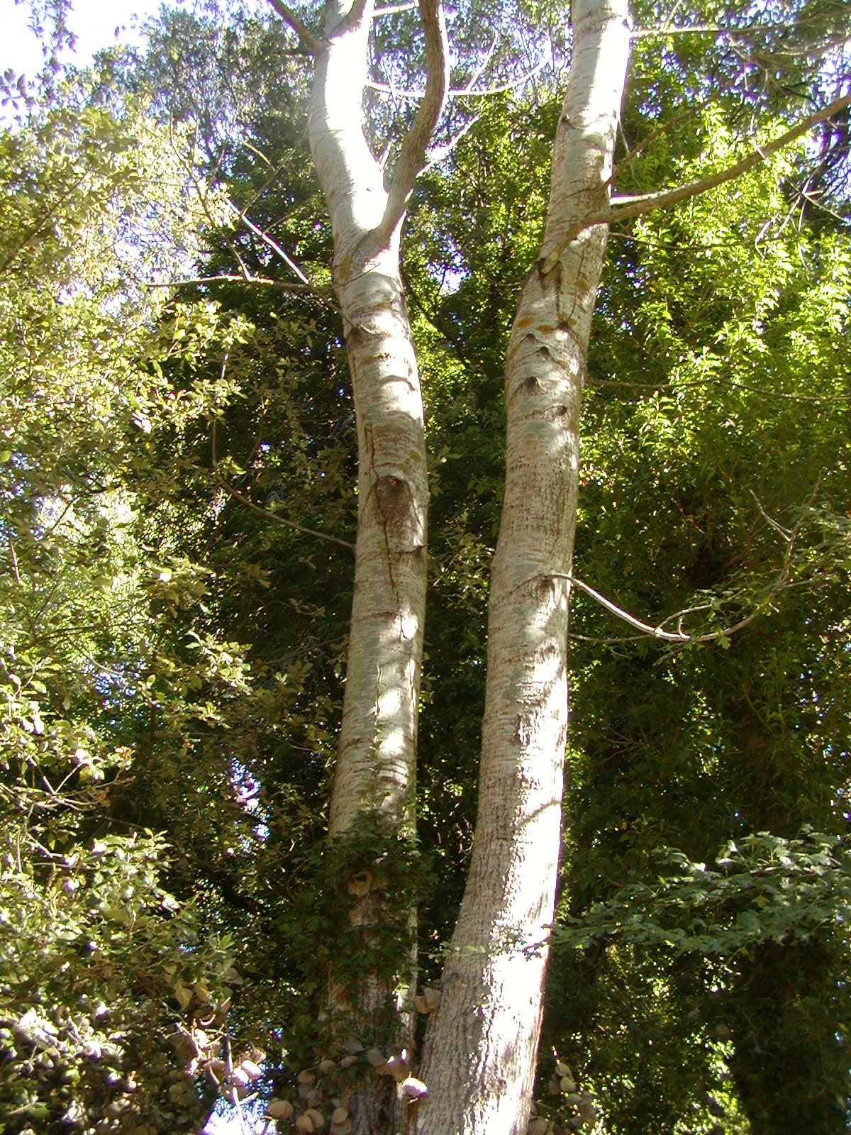 Populus tremula (not P. alba as filename states)